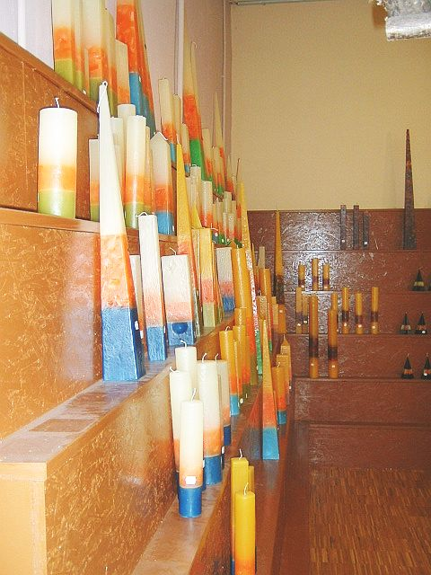 Bunte handgegossene Kerzen